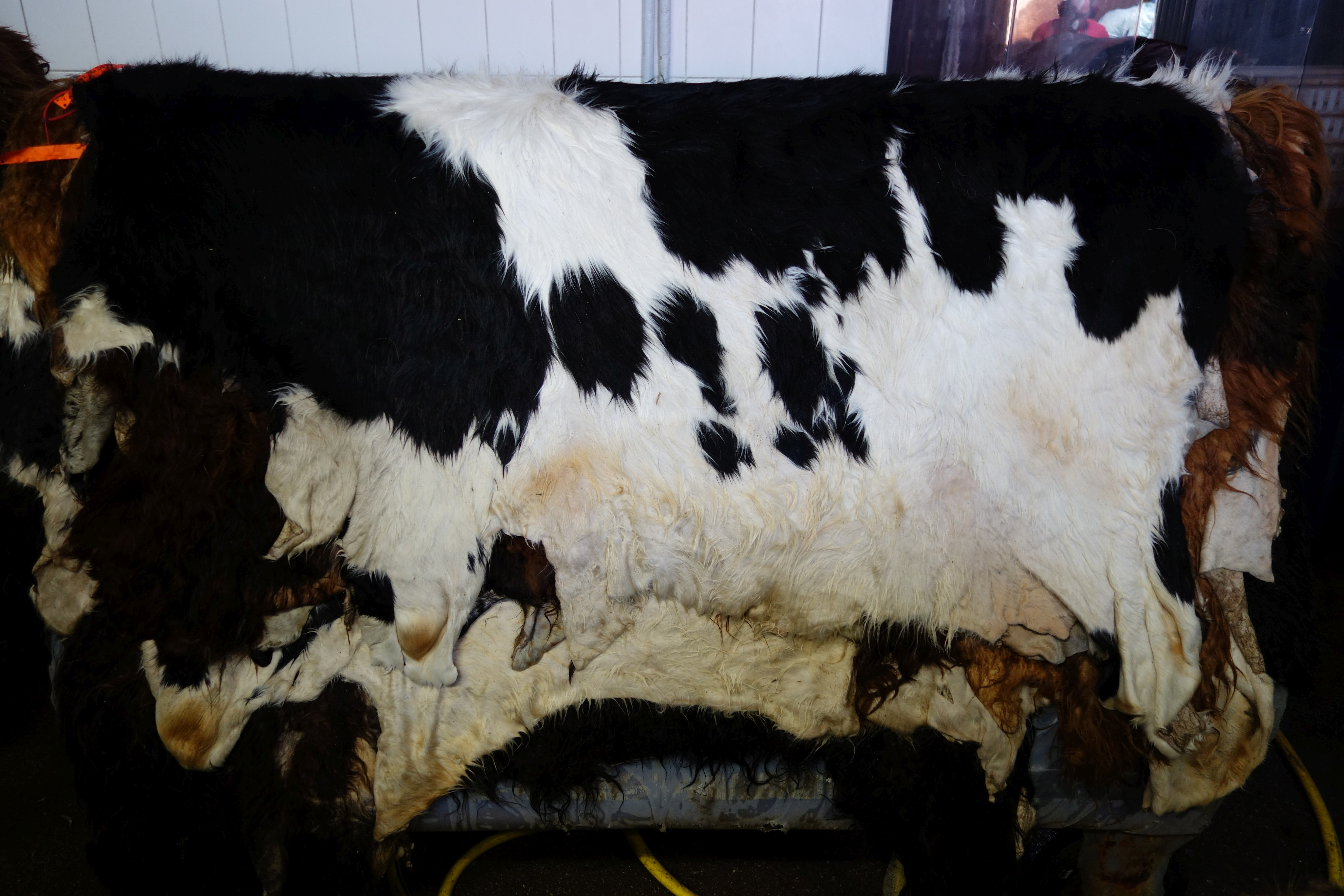 Nasse Rindshäute während der Zurichtung. Aufgenommen in der Kürschnerei und Pelz-Zurichterei Udo Meinelt & Söhne, Rötha.